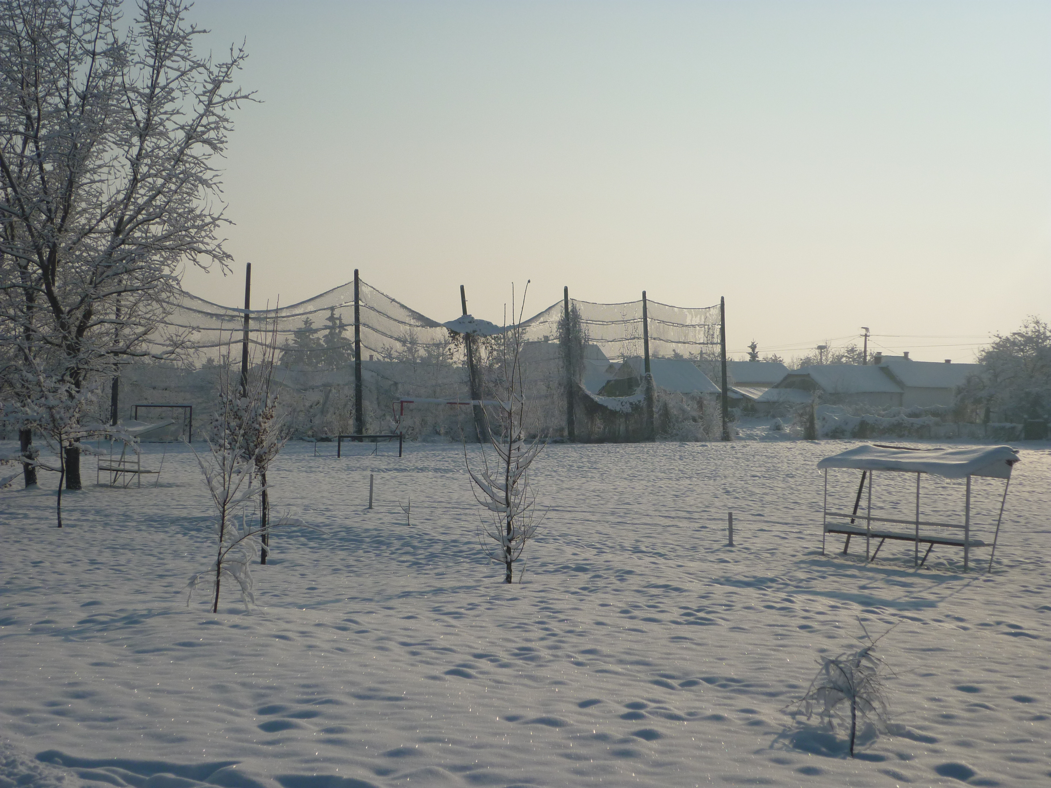 Tiszaszőlősi sportpálya (Jász-Nagykun-Szolnok megye)